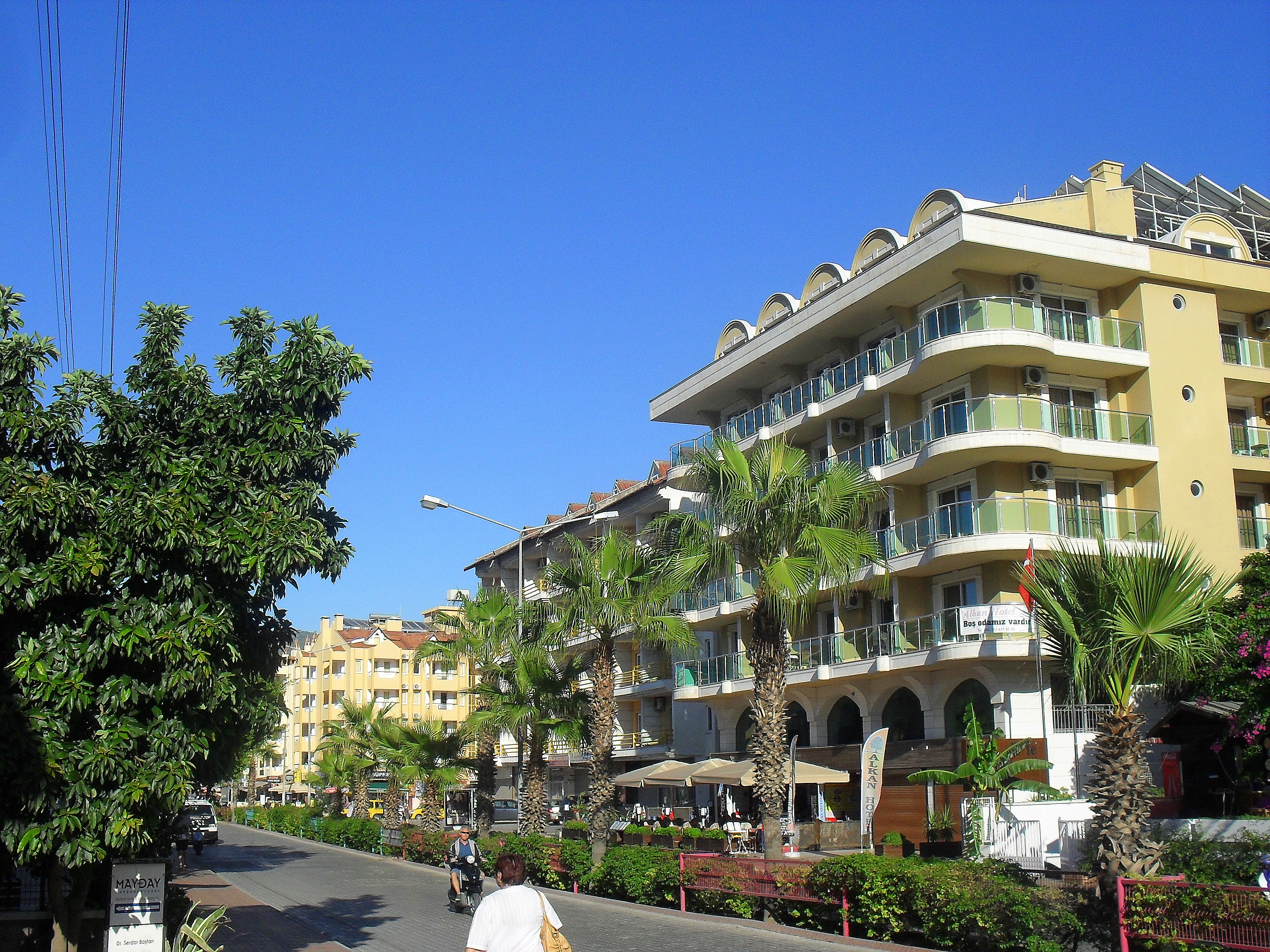 Marmaris, centrum